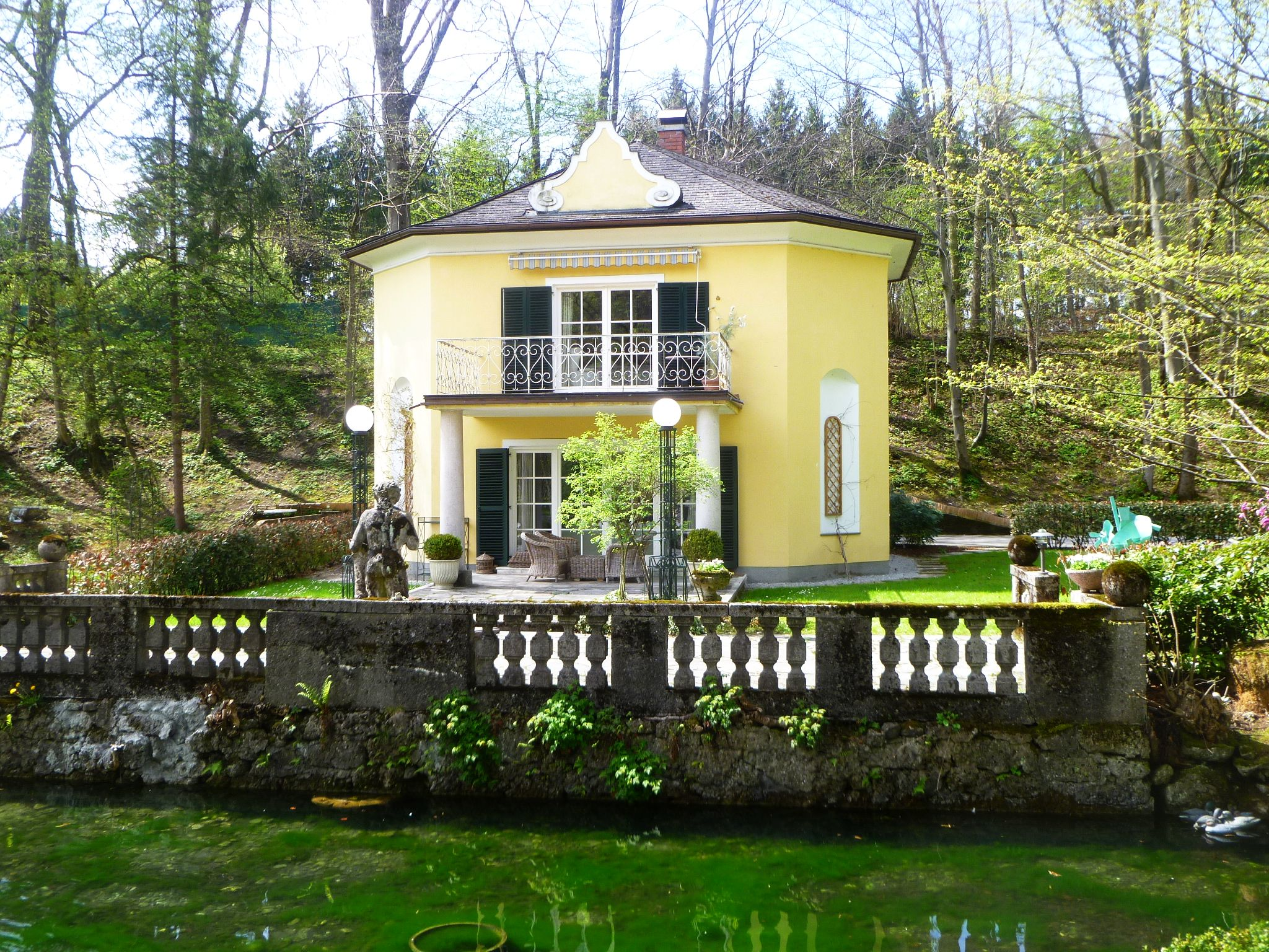 Hotel Restaurant Maria Theresien-Schlössl